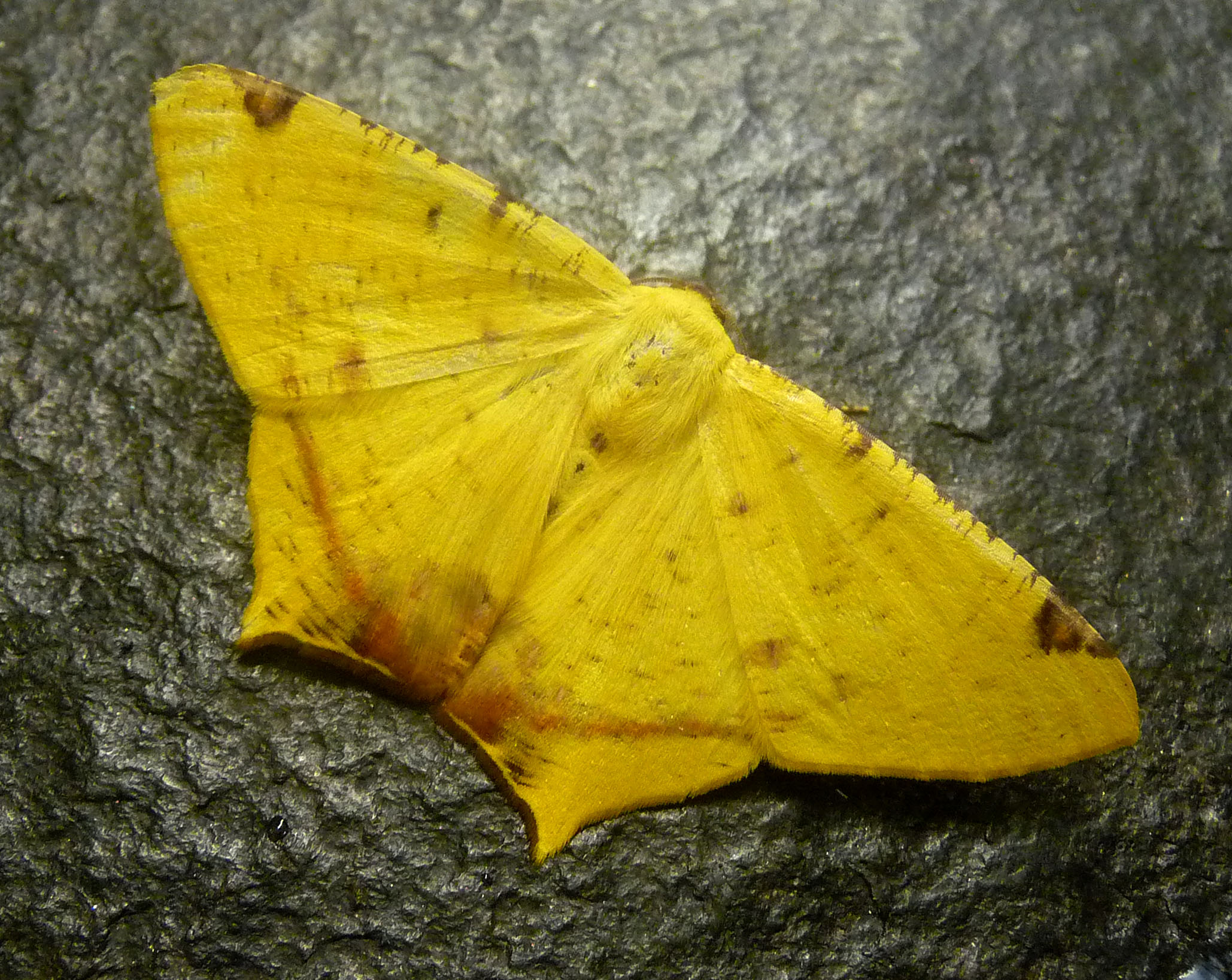 Geometridae. Nepheloleuca complicata.